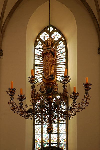 Marienleuchter in der Lambertuskirche zu Erkelenz, dahinter ein Bleiglasfenster nach einem Entwurf von Will Völker